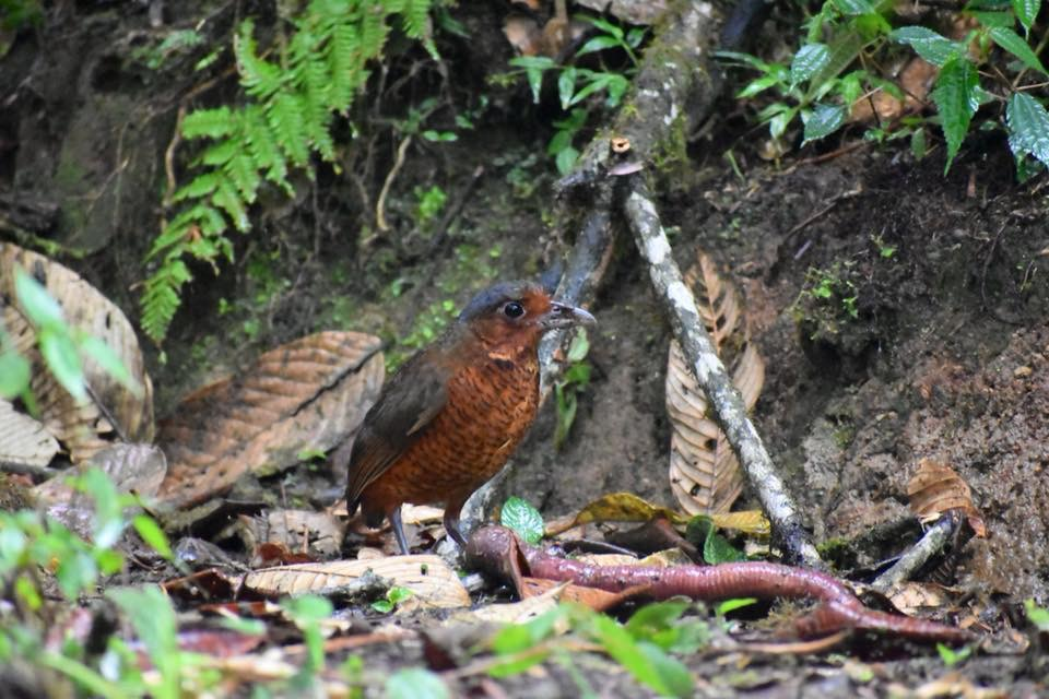 RESERVA LAS GRALARIAS